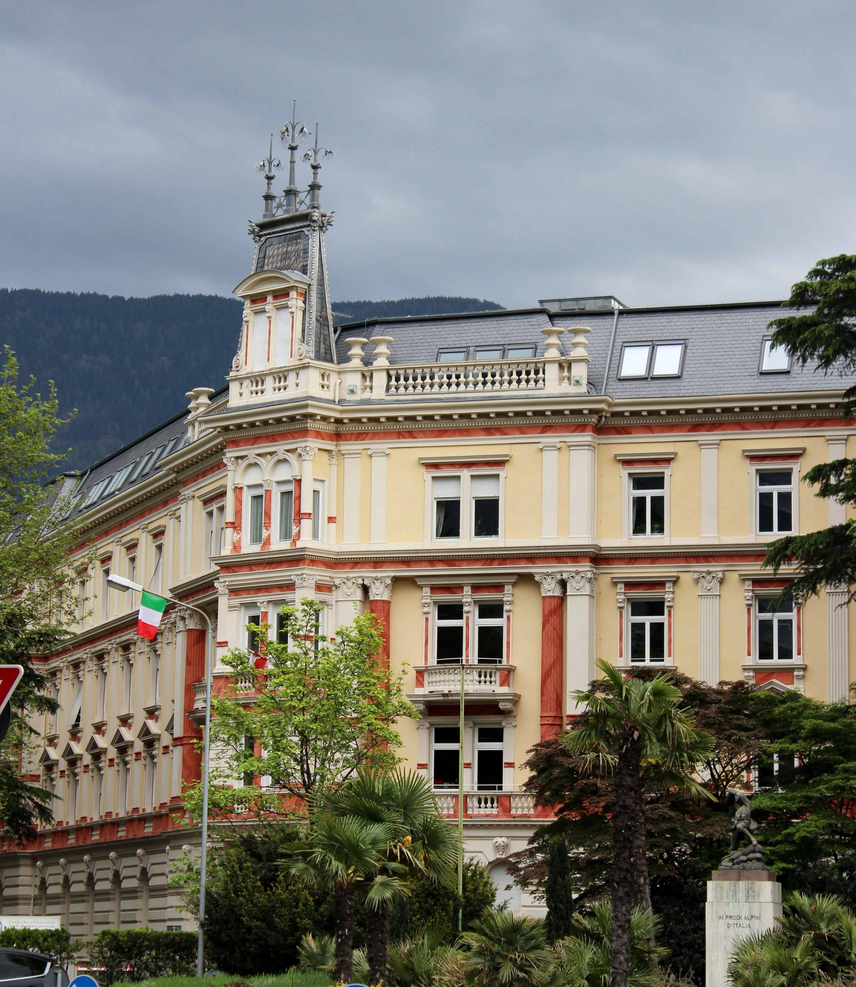 Freiheitsstraße 155